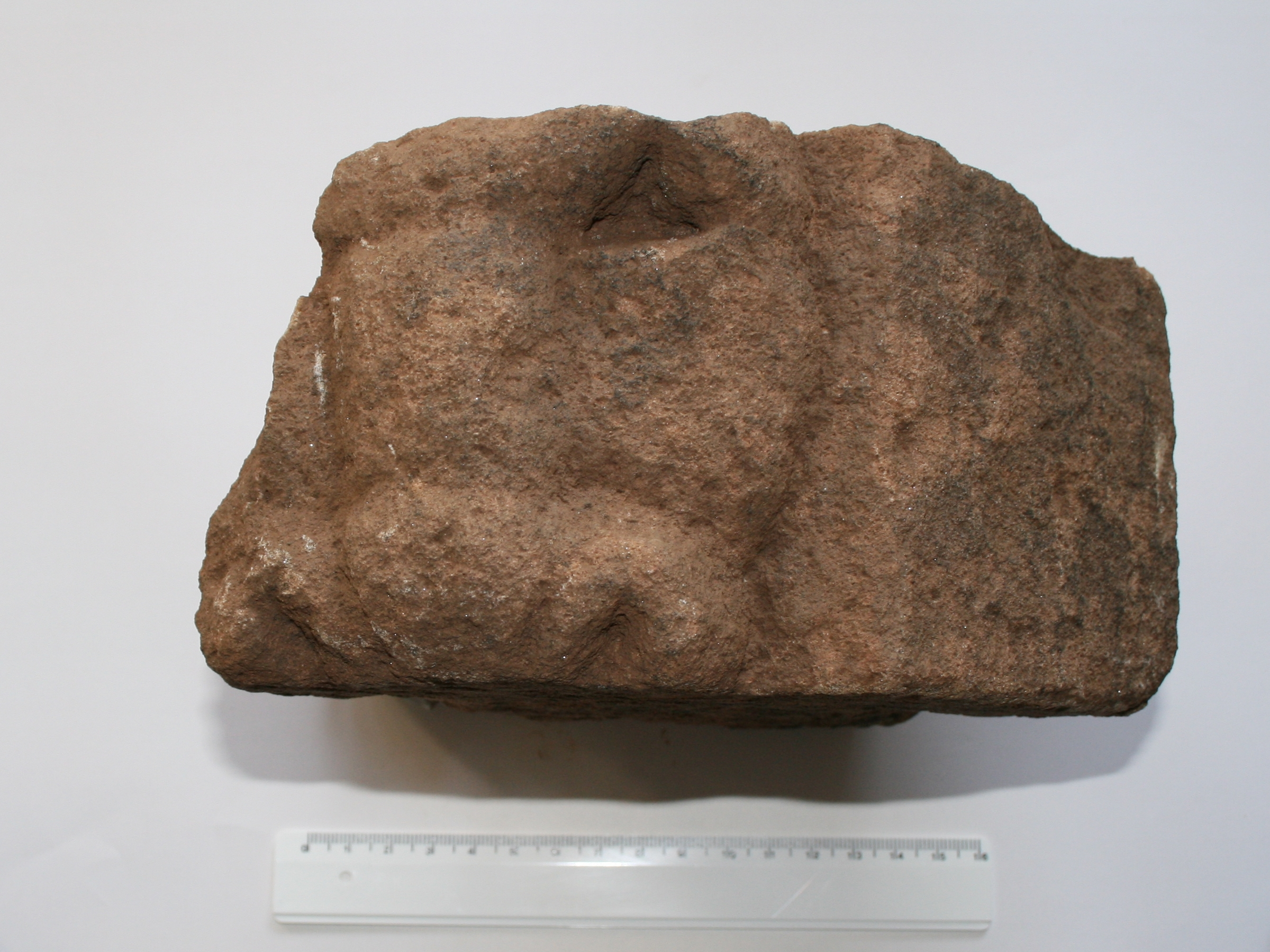 Relieffragment der Jupitergigantensäule von der Villa rustica "Haselburg" bei Höchst i. Odw. Das Bruchstück stellt vermutlich einen Löwenkopf dar und wird als Hinweis auf eine Herculesdarstellung auf dem Viergötterstein gewertet.